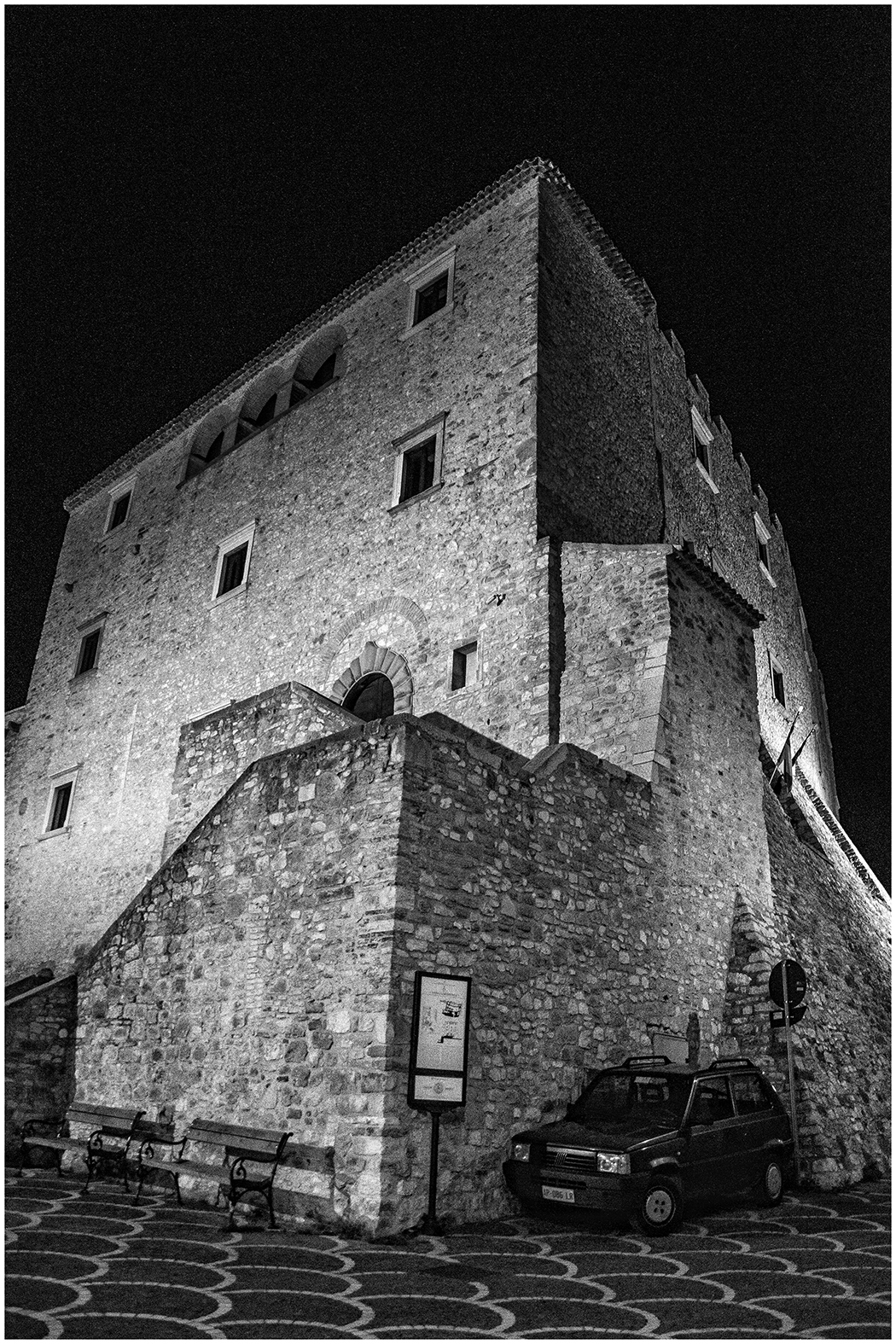 Castello di Capua - MIBAC This is a photo of a monument which is part of cultural heritage of Italy.